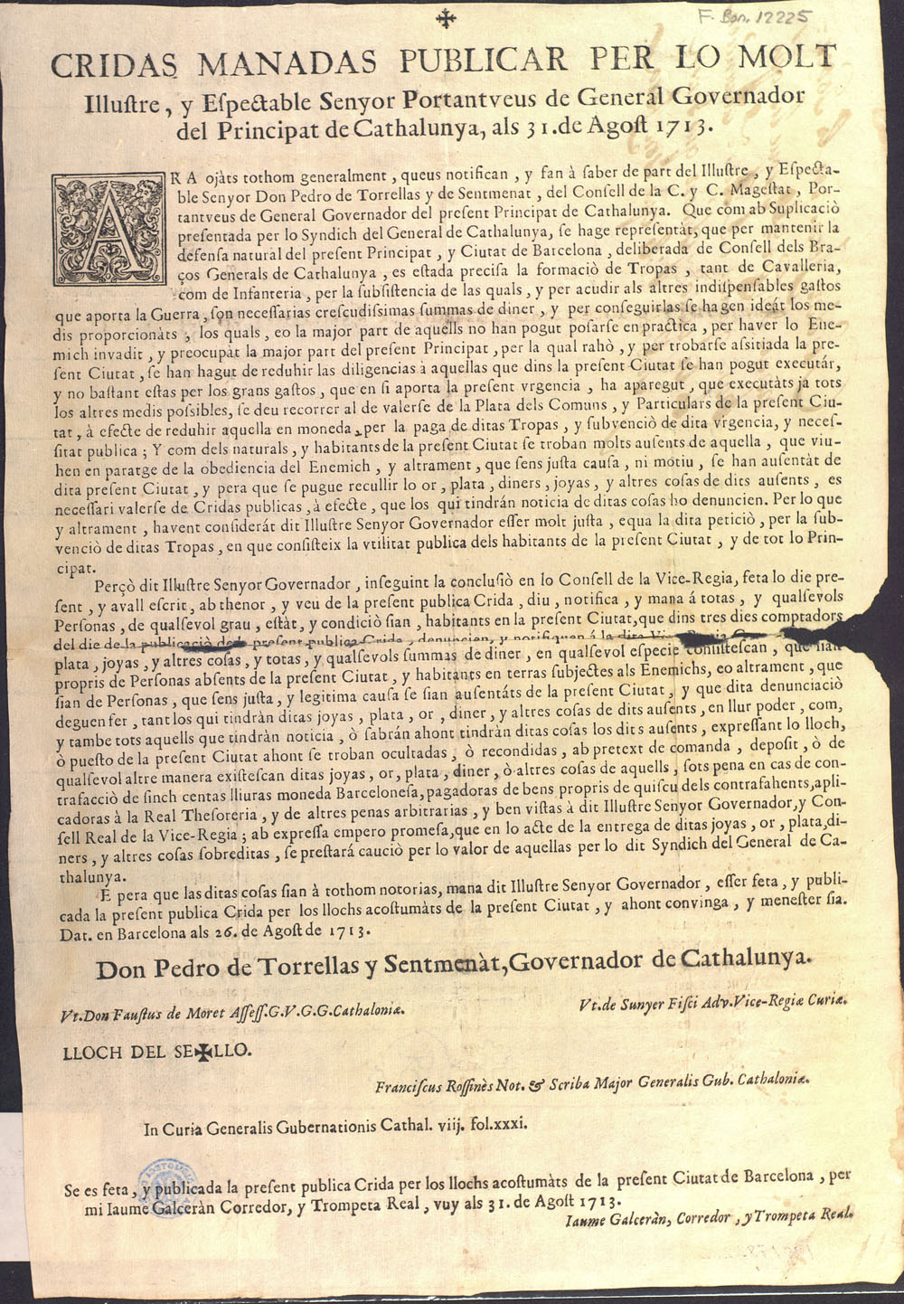 Ejercito de Cataluña. Financiación